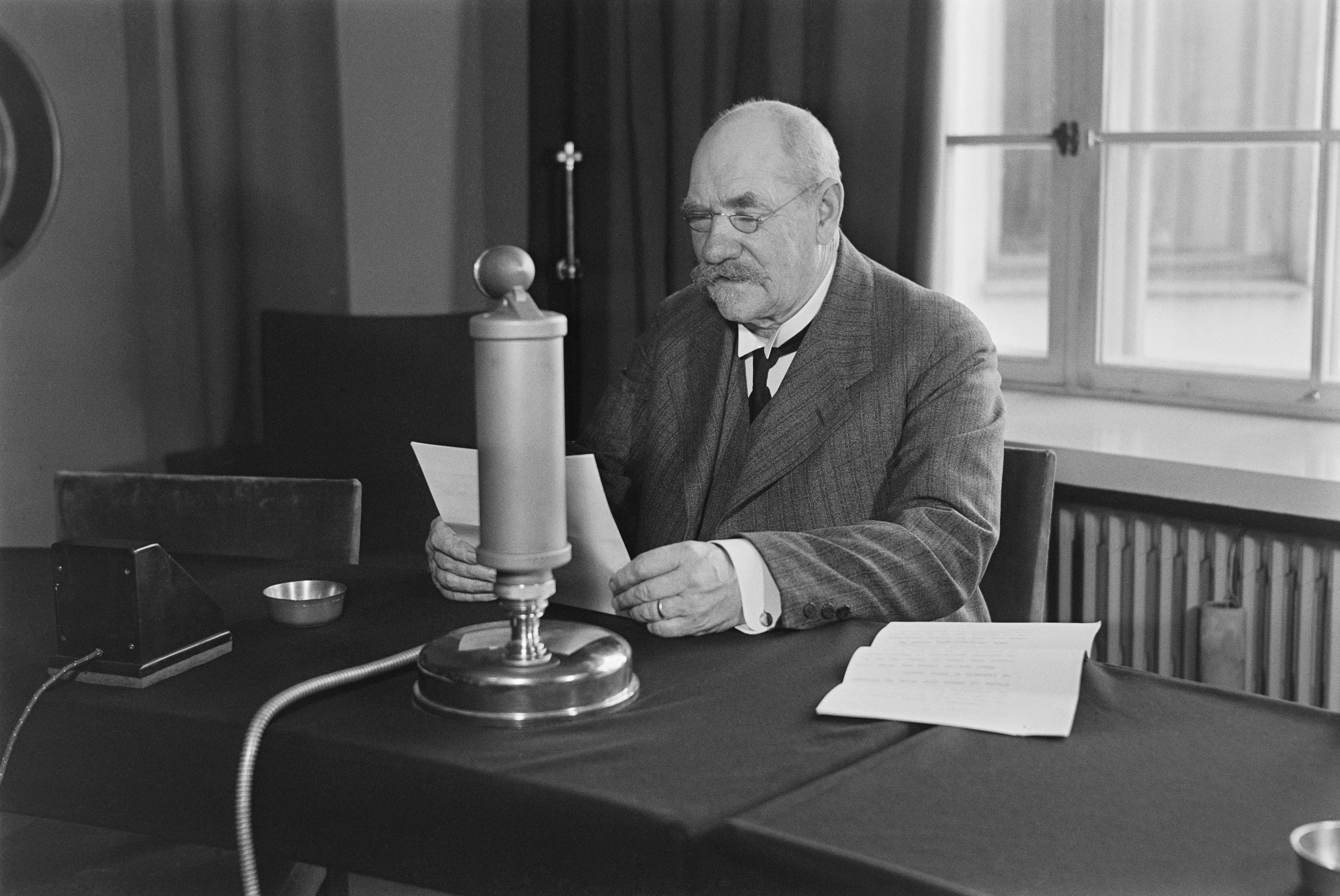 Tasavallan presidentti Pehr Evind Svinhufvud pitää radiopuhetta Yleisradion 10-vuotispäivän kunniaksi Radiotalon studiossa 1936. Tiedätkö jotain tästä kuvasta? Jätä kommentti tai ota yhteyttä sähköpostitse: Tutustu Ylen arkistosisältöihin: Fler skatter från Yles arkiv: More about Yle, the Finnish Broadcasting Company